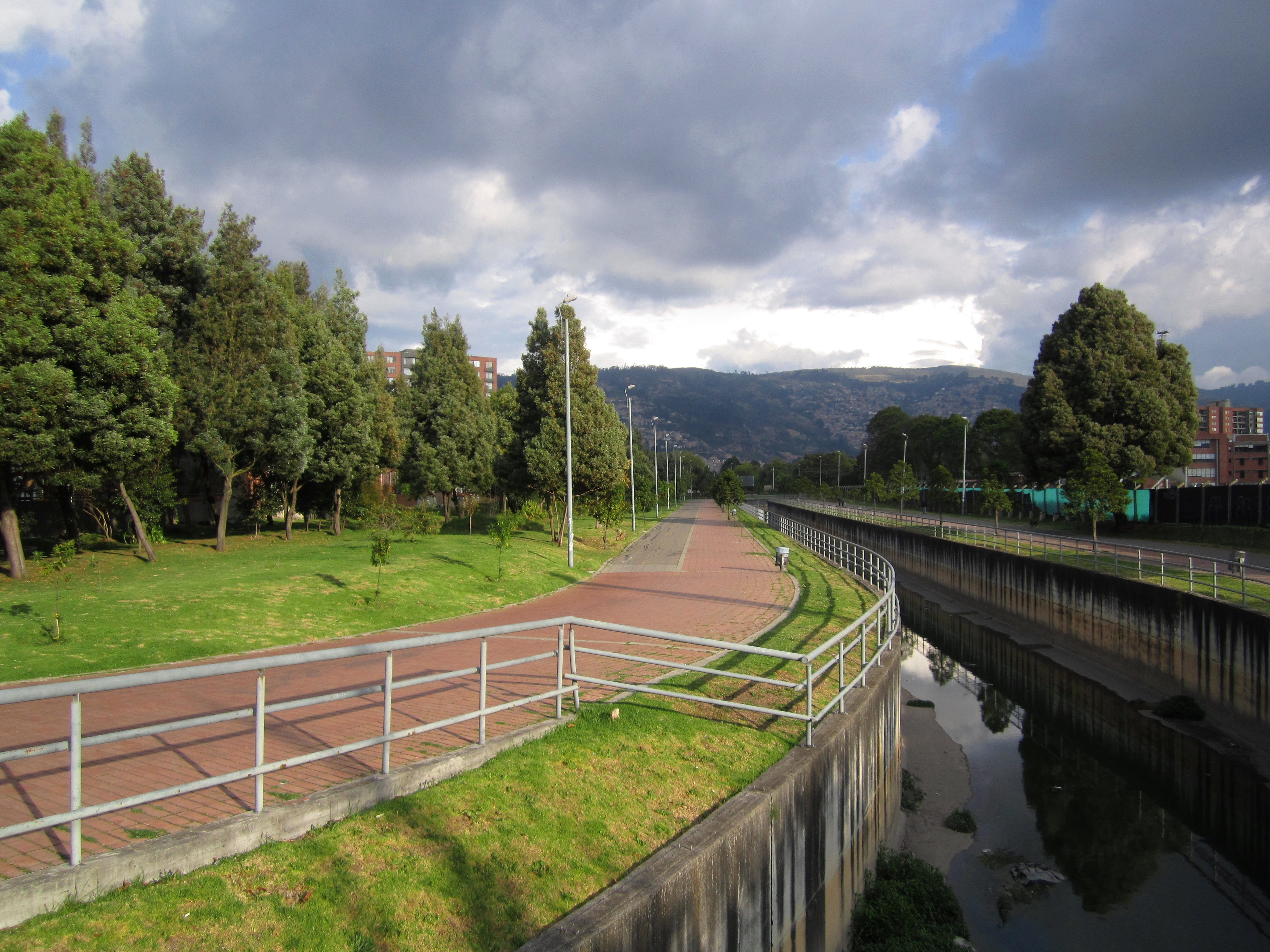 Barrio Cantagallo, localidad de Suba, canal de Córdoba en la calle 161 con carrera 54 Bogotá.